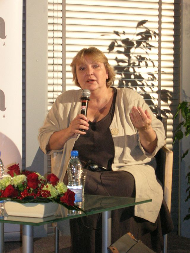 Dubravka Ugrešić (b. 1949), Croatian writer